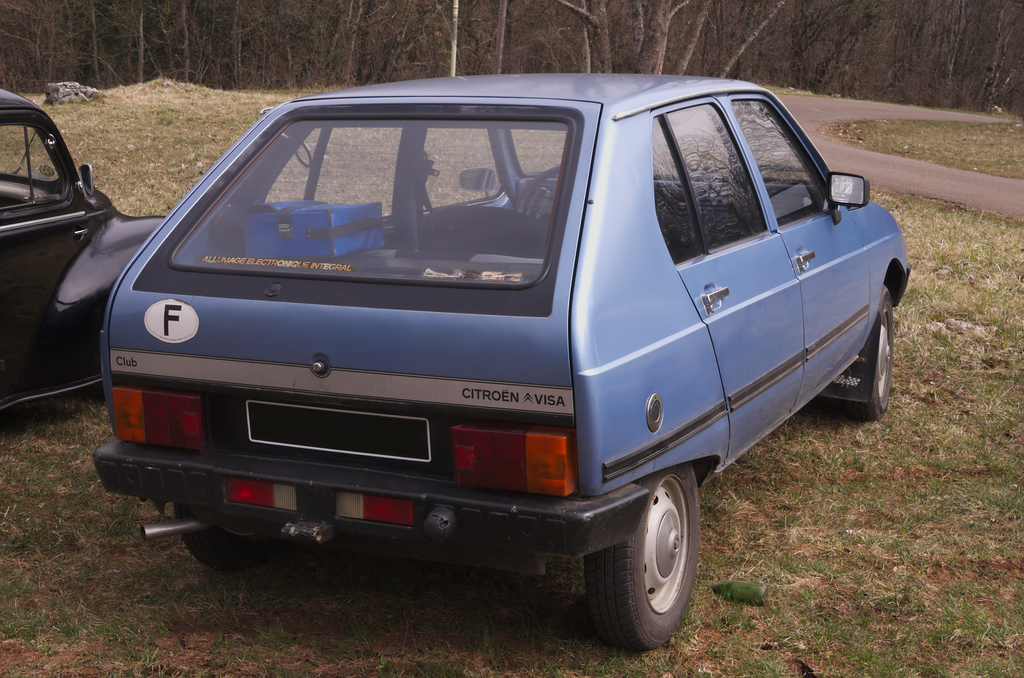 Sortie Soupapes dégrippées 07-04-2013 - Citroen Visa